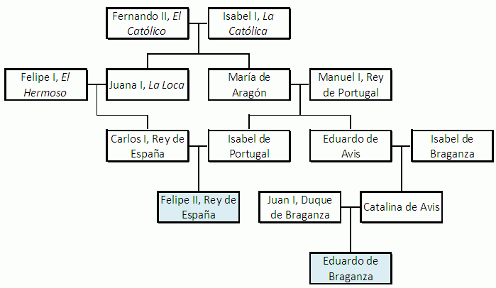 Gráfico que muestra la relación familiar entre el I Marqués de Frechilla y Villarramiel y Felipe II de España, Rey que le concedió el título nobiliario